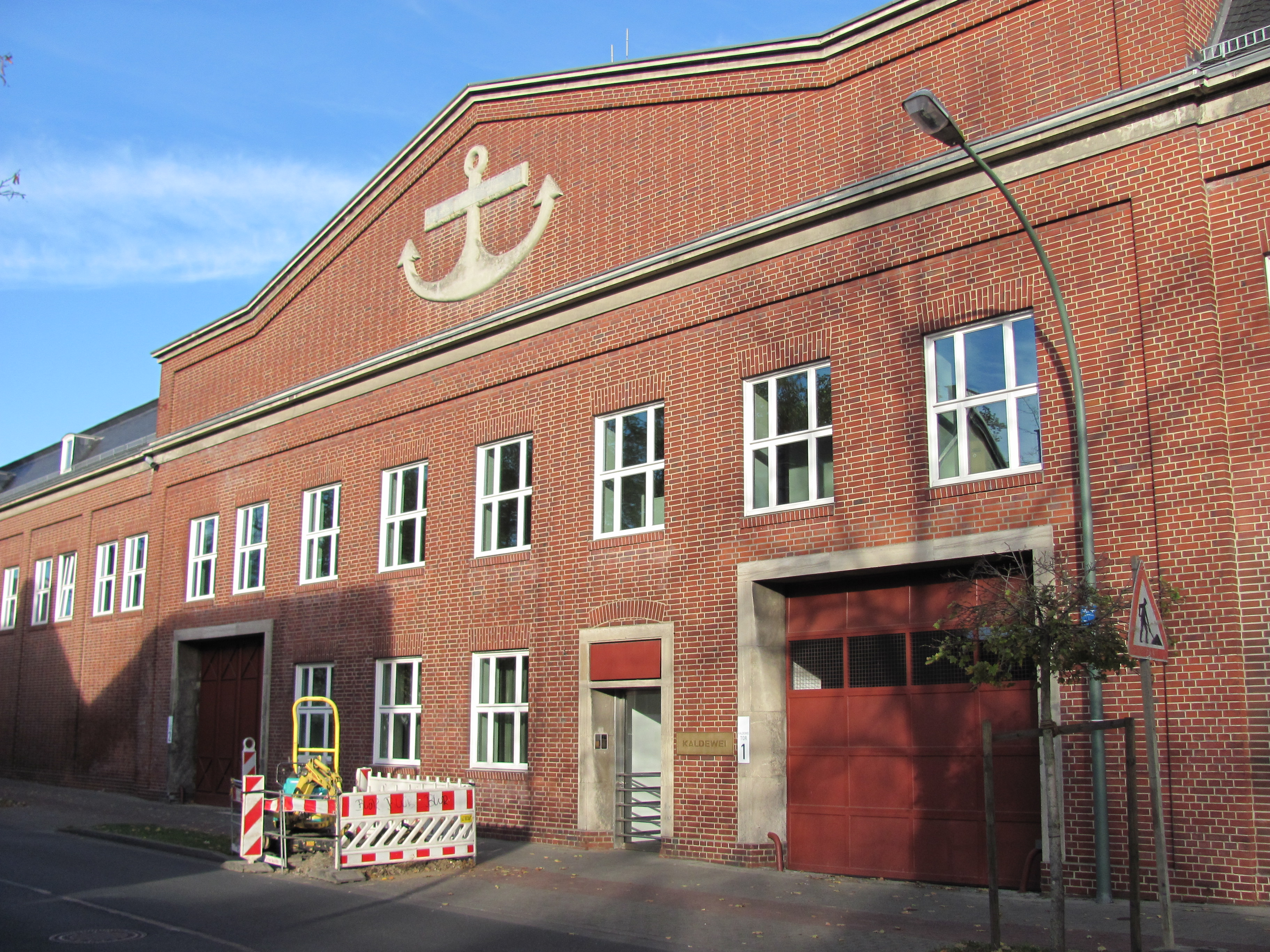 Hauptgebäude der Firma Kaldewei an der Beckumer Straße in Ahlen